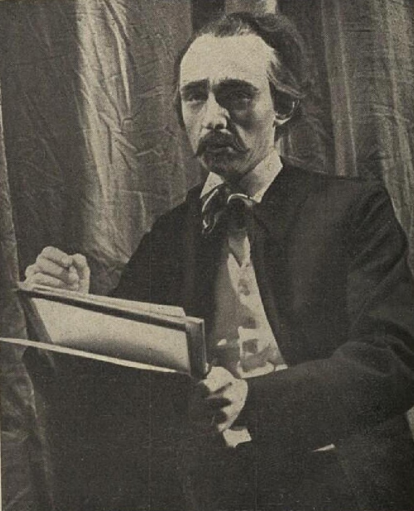 Karel Pech (1917-2006), český herec, režisér, televizní scenárista, jazykový poradce a pedagog, televizní i rozhlasový moderátor a spisovatel